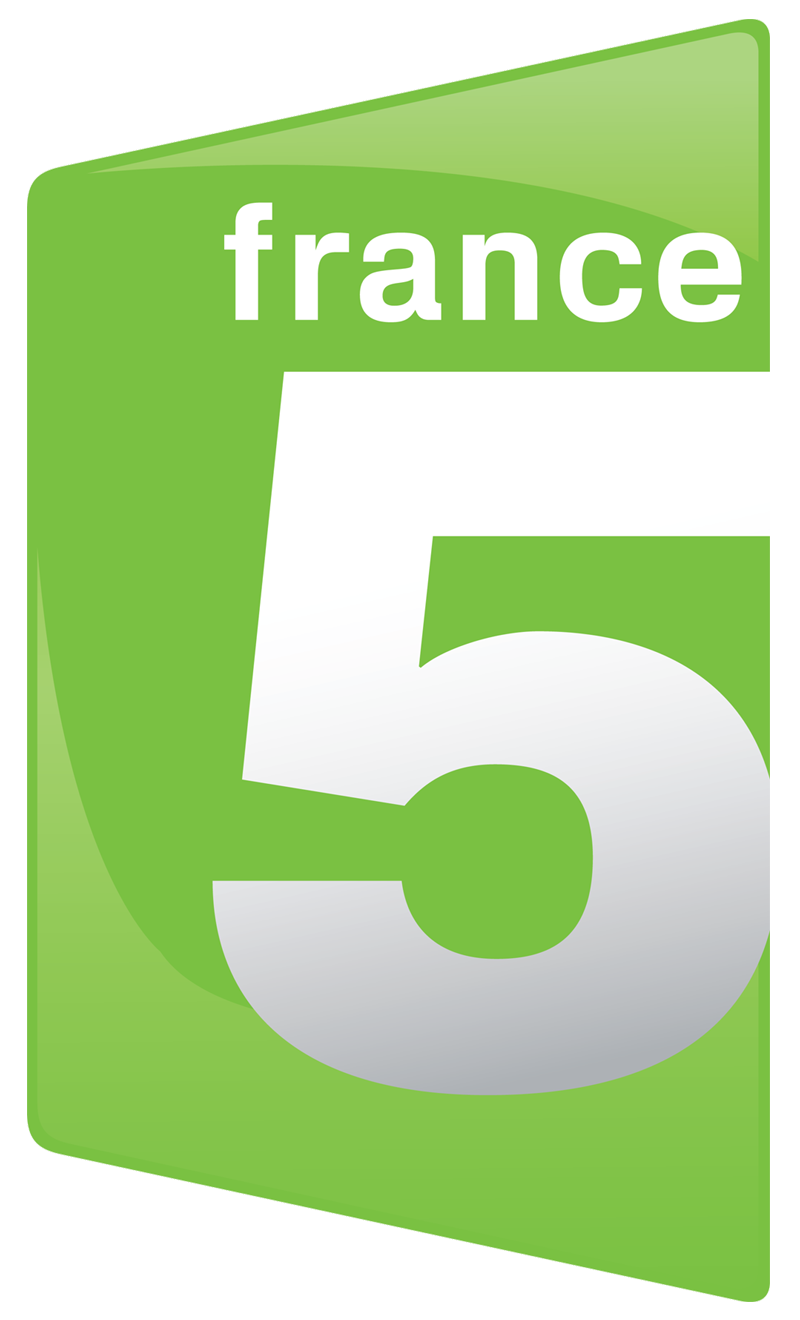 Логотип телеканала France Televisions